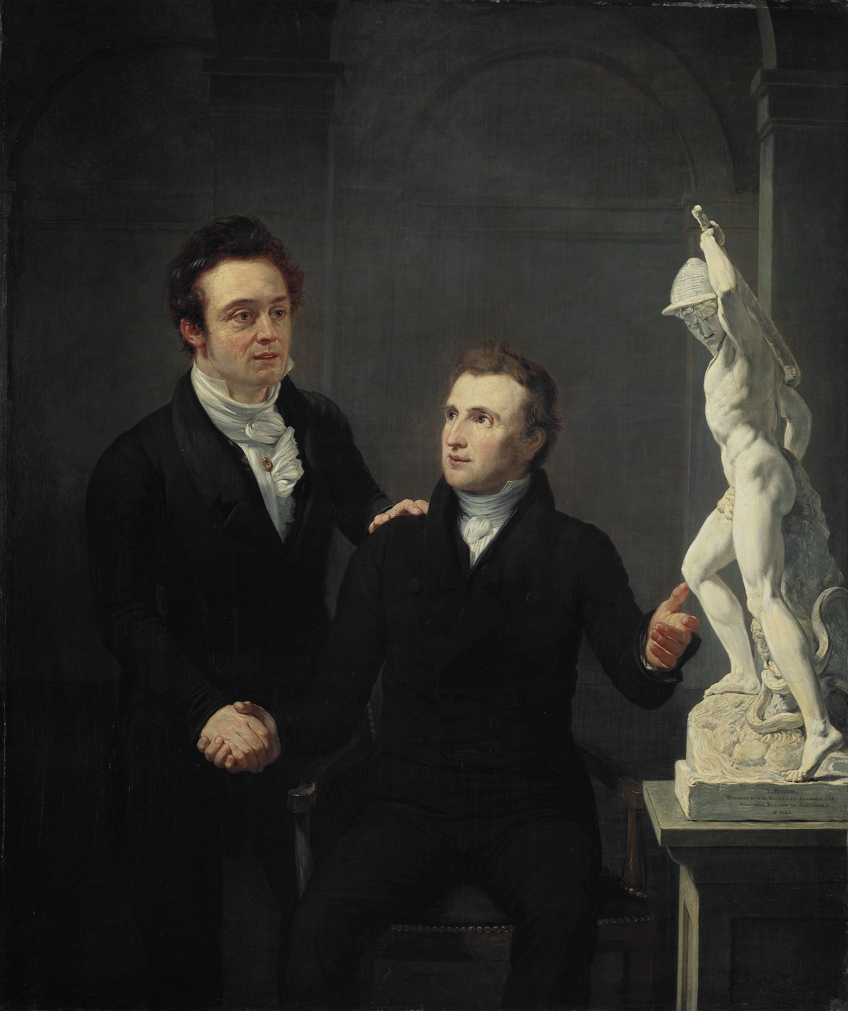 Louis Royer (1787-1868), beeldhouwer en Albertus Bernardus Roothaan (1793-1847), makelaar in effecten, kunstvriend en bevorderaar der wetenschappen. Roothaan wenst Royer geluk met zijn "Prix de Rome", in het Trippenhuis. De twee mannen geven elkaar de hand, rechts op een tafel staat het beeld van Royer van een Griekse herder die een slang verslaat.